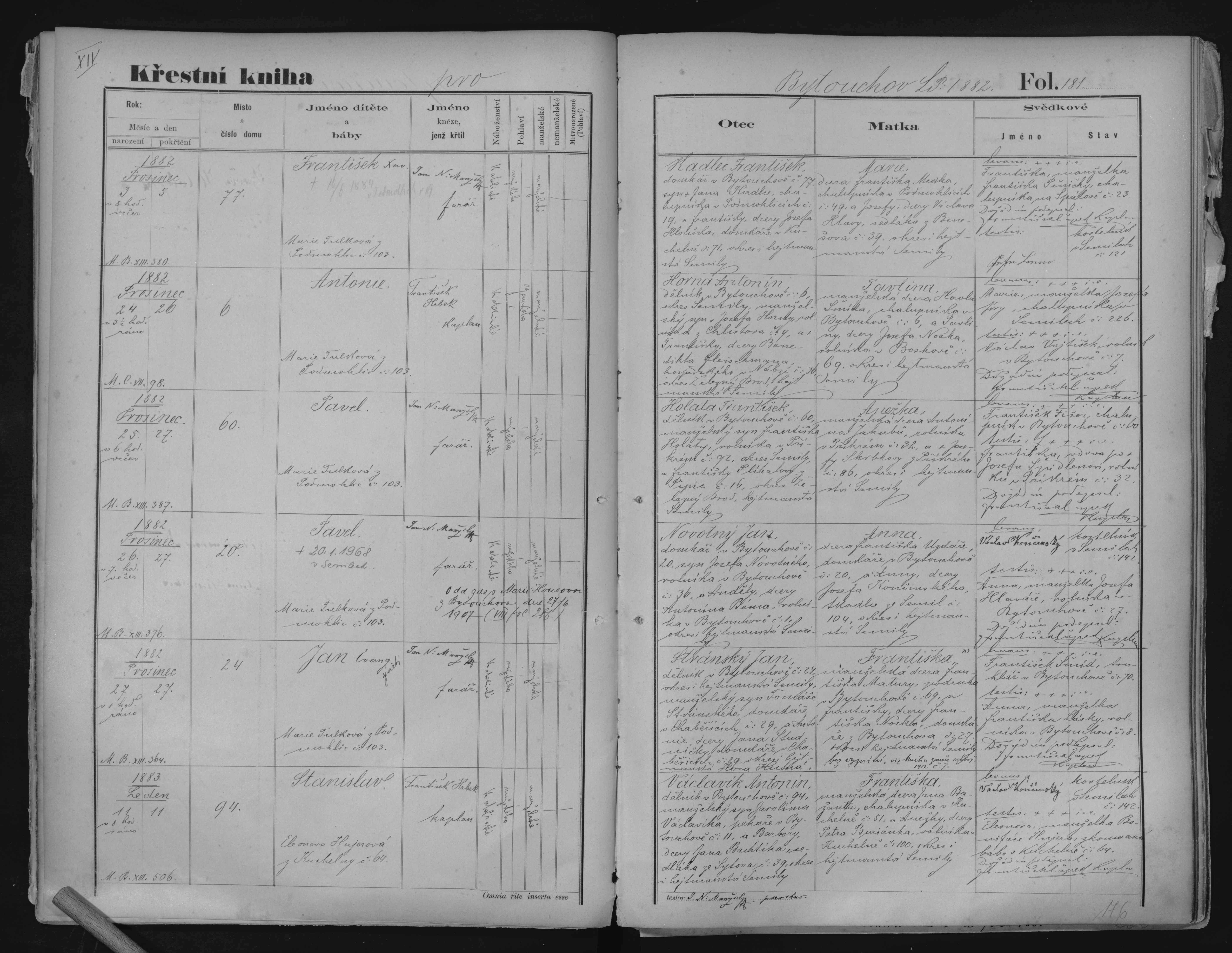 Stránka 181 z matriční knihy 5674. SOA Zámrsk.